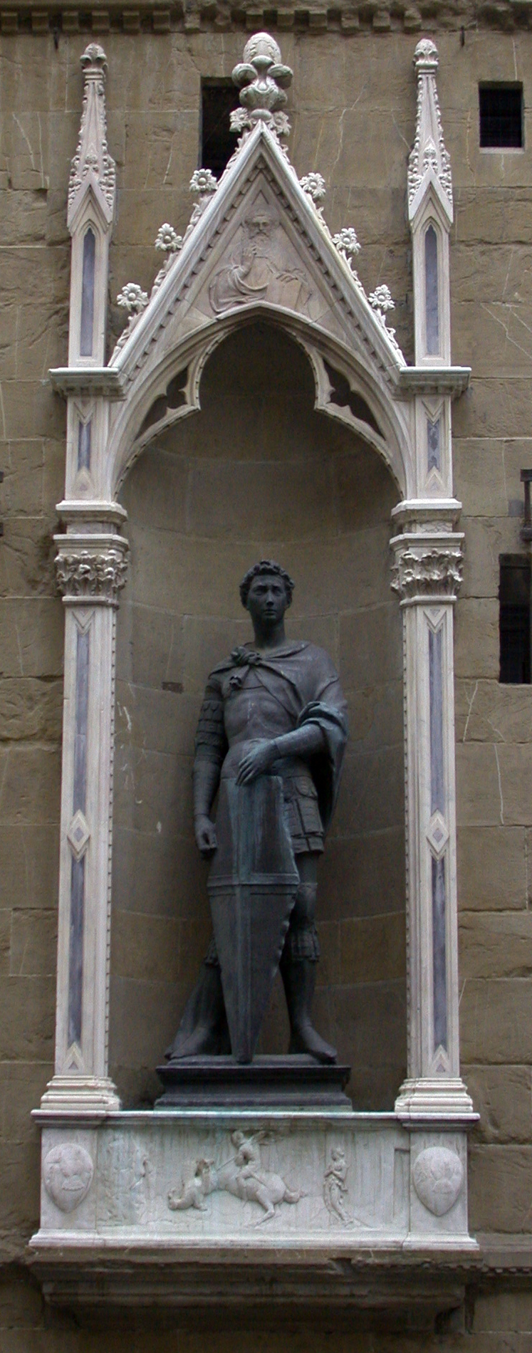 Statue de Saint Georges à Orsanmichele par Donatello